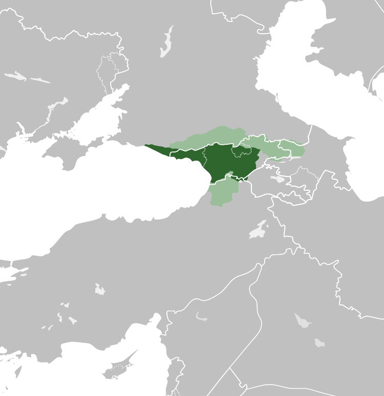 აფხაზეთის სამეფოს საზღვრები